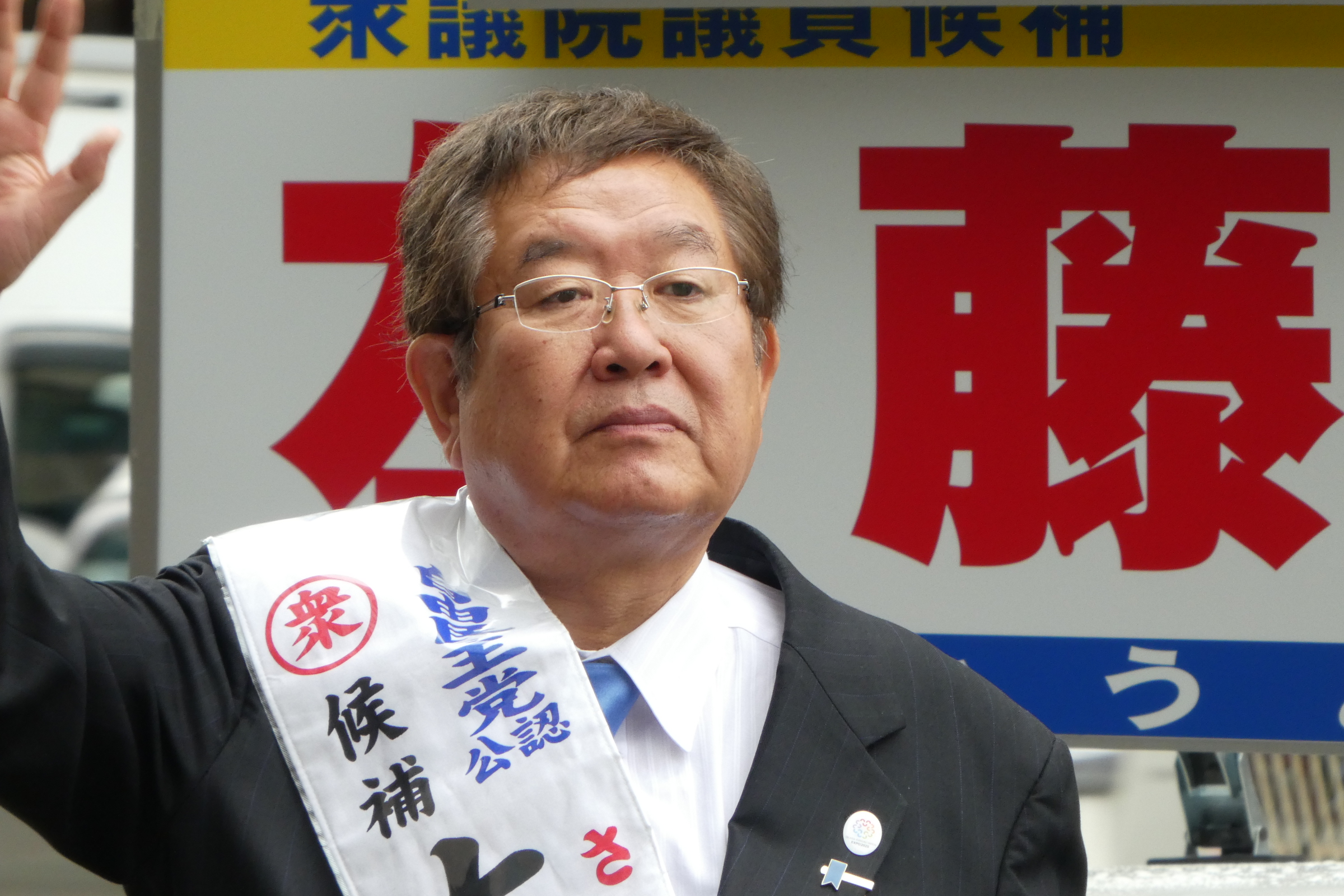 大阪市内で街頭に立つ左藤章。